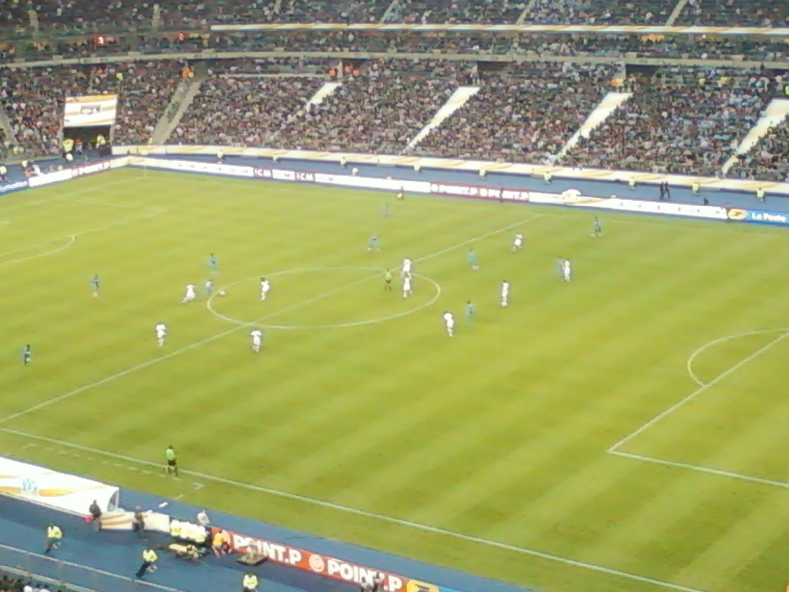 Match Lyon - Marseille en finale de la Coupe de la Ligue 2012